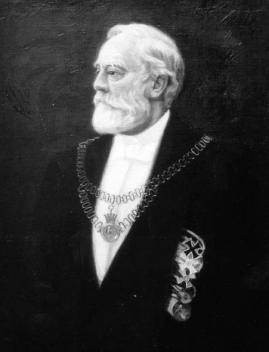 Viktor Kaifer (1831–1913), Bürgermeister von Andernach, Mülheim am Rhein und München-Gladbach